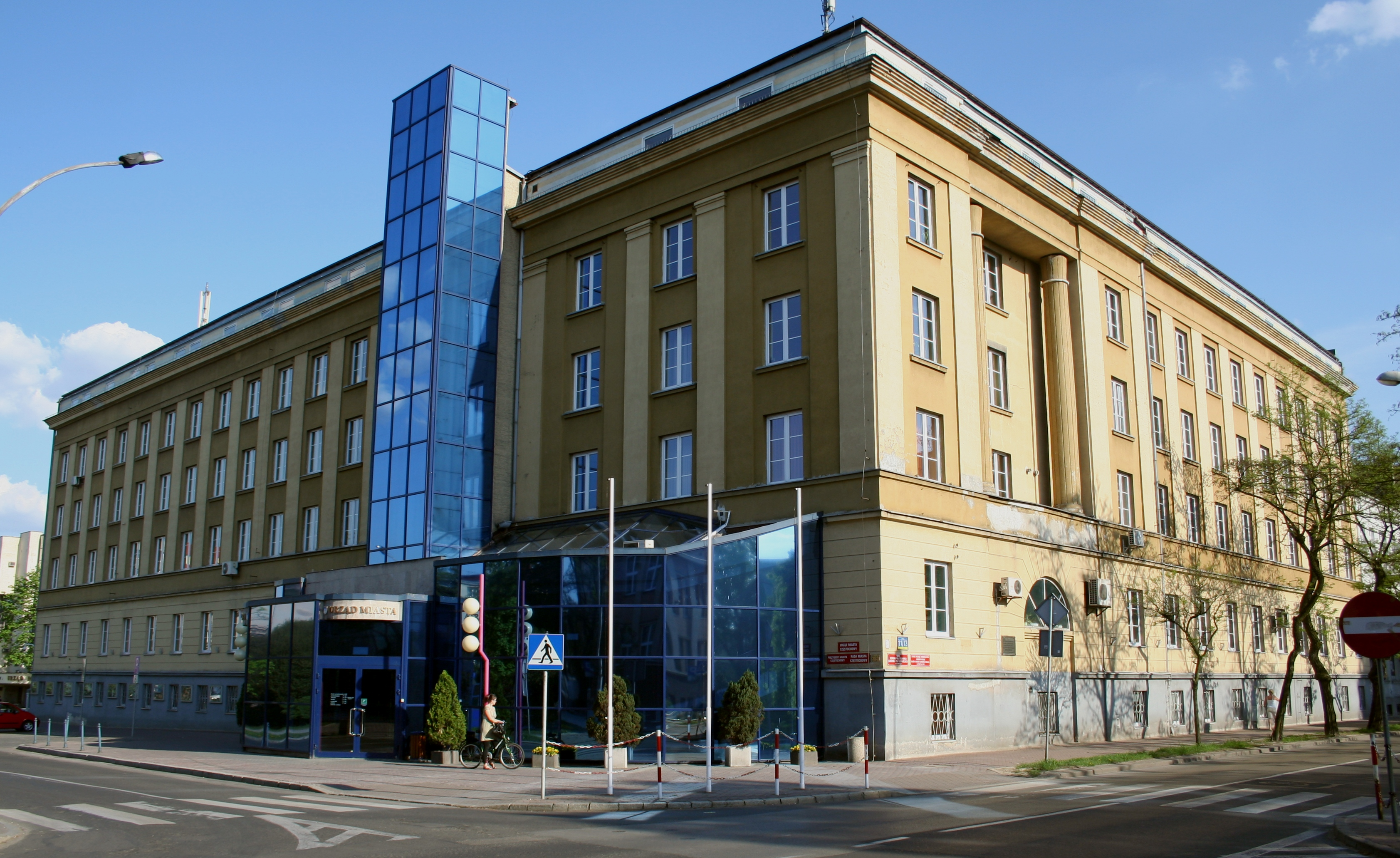 Częstochowa budynek urzędu miasta